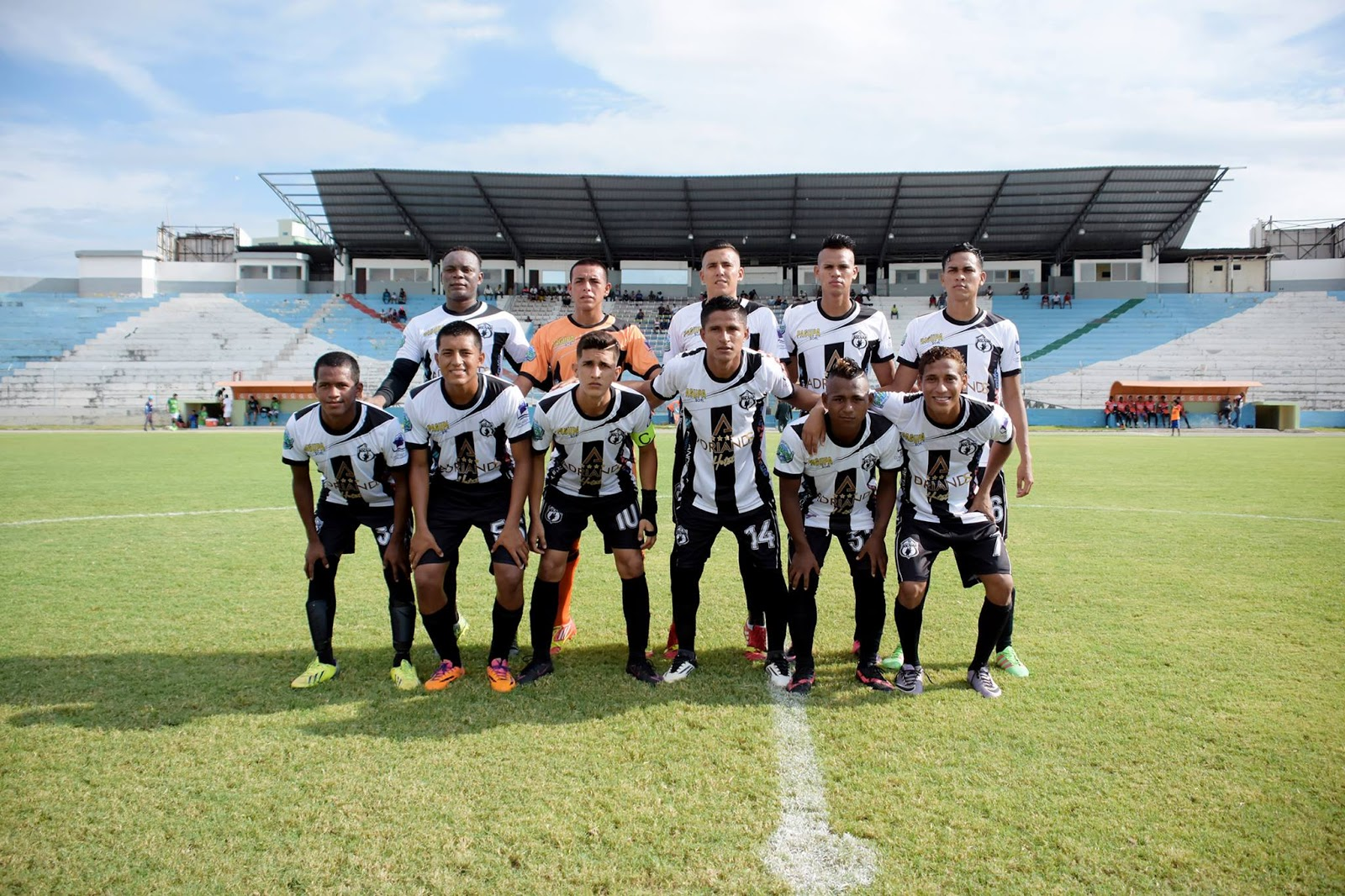 El Deportivo Bolivar en un partido en el 2016